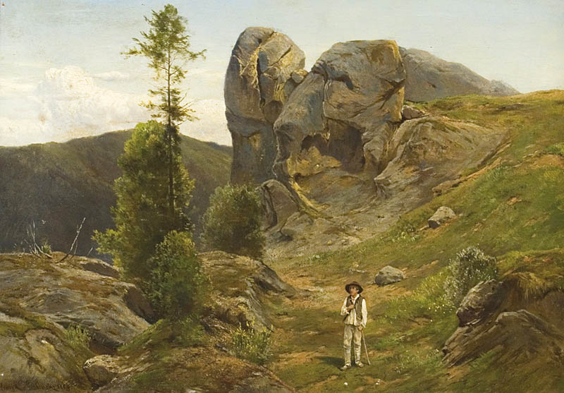 W Ojcowie